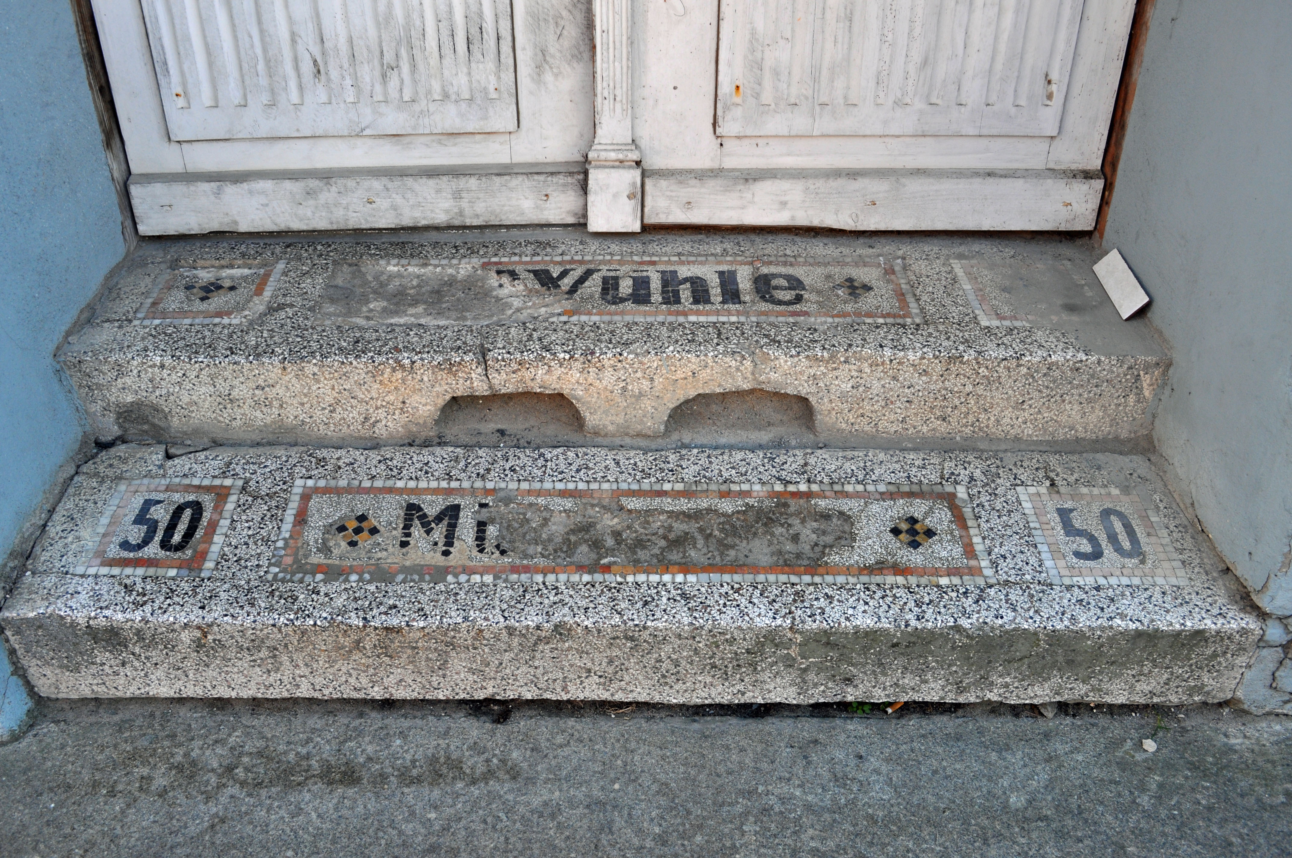 Gebäude bzw. Gebäudedetail in Stralsund. Straße und Hausnummer siehe Dateiname.